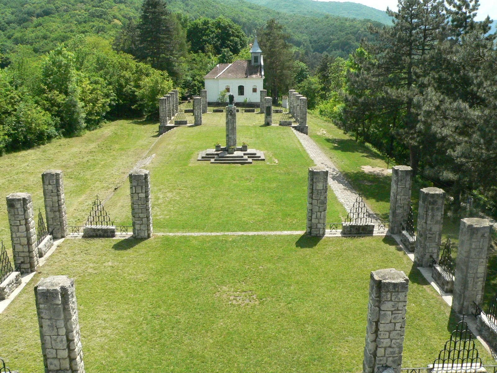 Zebegény, Országzászló és hősi emlékmű; az Emlékhely látképe az országzászlón kialakított kilátóból